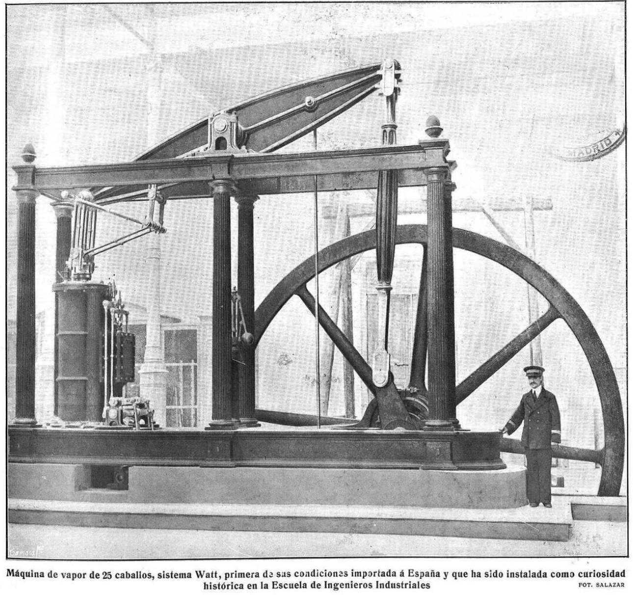 Recorte de laRecorte de la página 22 del Nº 20 de la revista La Esfera